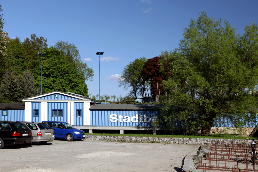 Eingangsgebäude des Radeberger Stadtbads